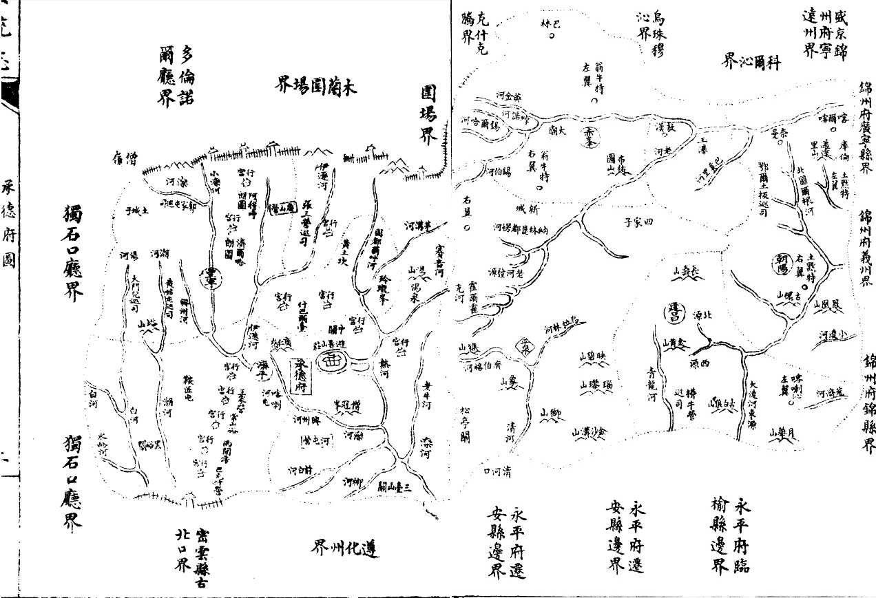 清朝政府在嘉庆年间官修典籍《大清一统志·卷四十二·承德府一》，承德府地图，有拼接。